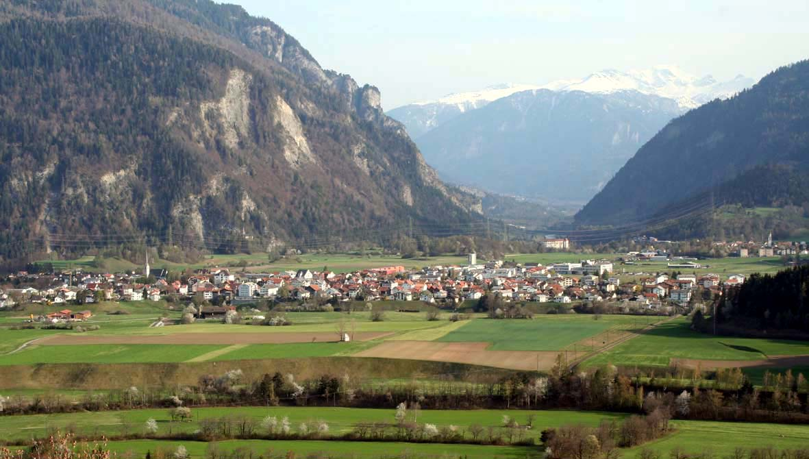 Bonaduz